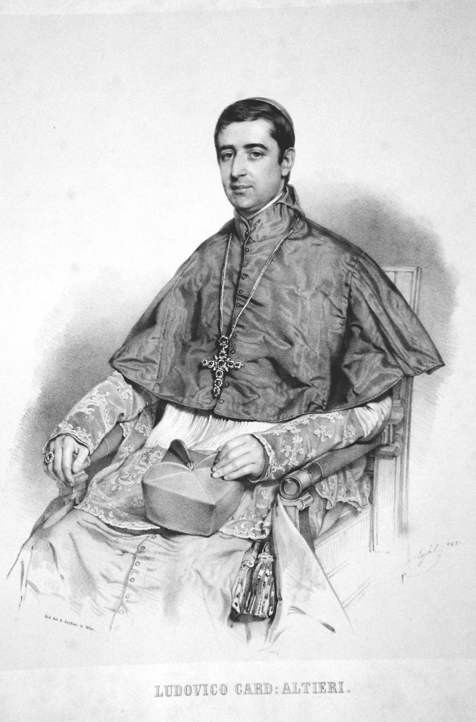 Lodovico Altieri (1805-1867), Diplomat, Kardinal, Bischof von Albano. Lithographie von Franz Eybl, ca. 1840